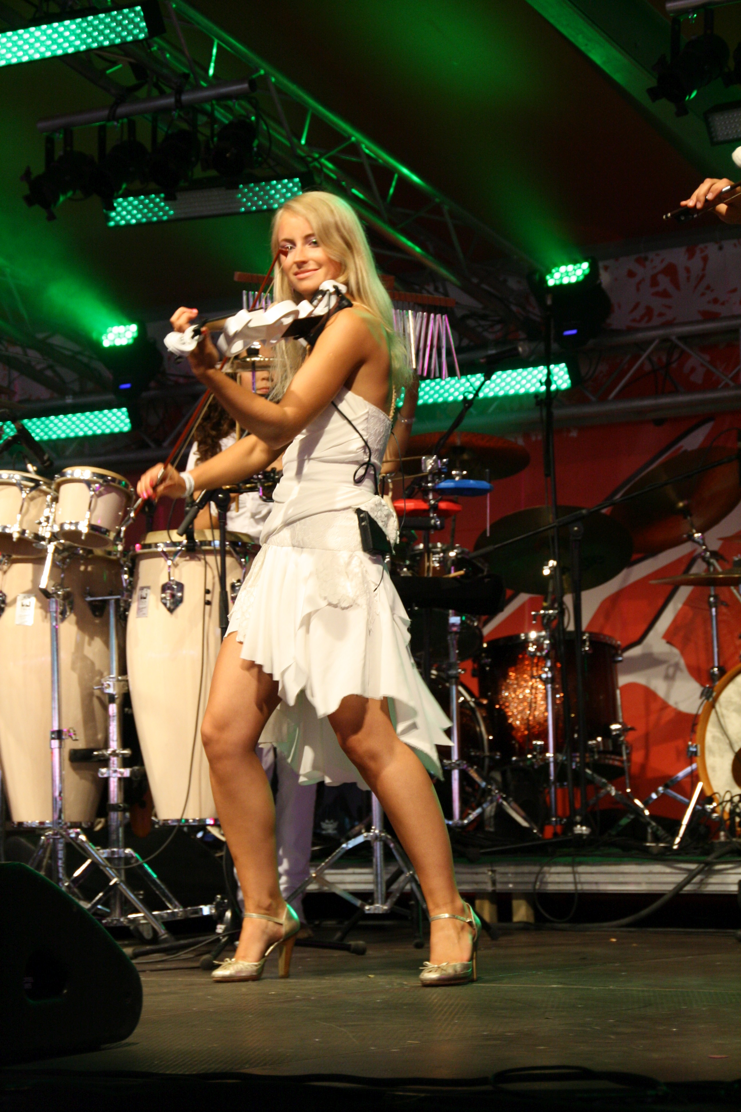 Johanna Marie Ainomäe esinemas ansambliga Violina Tallinna Lauluväljakul Õllesummeril